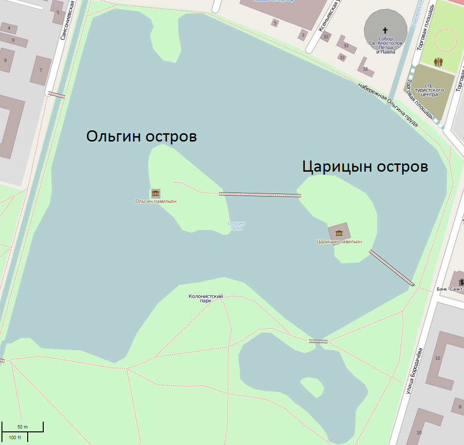 Схема Ольгоно пруда